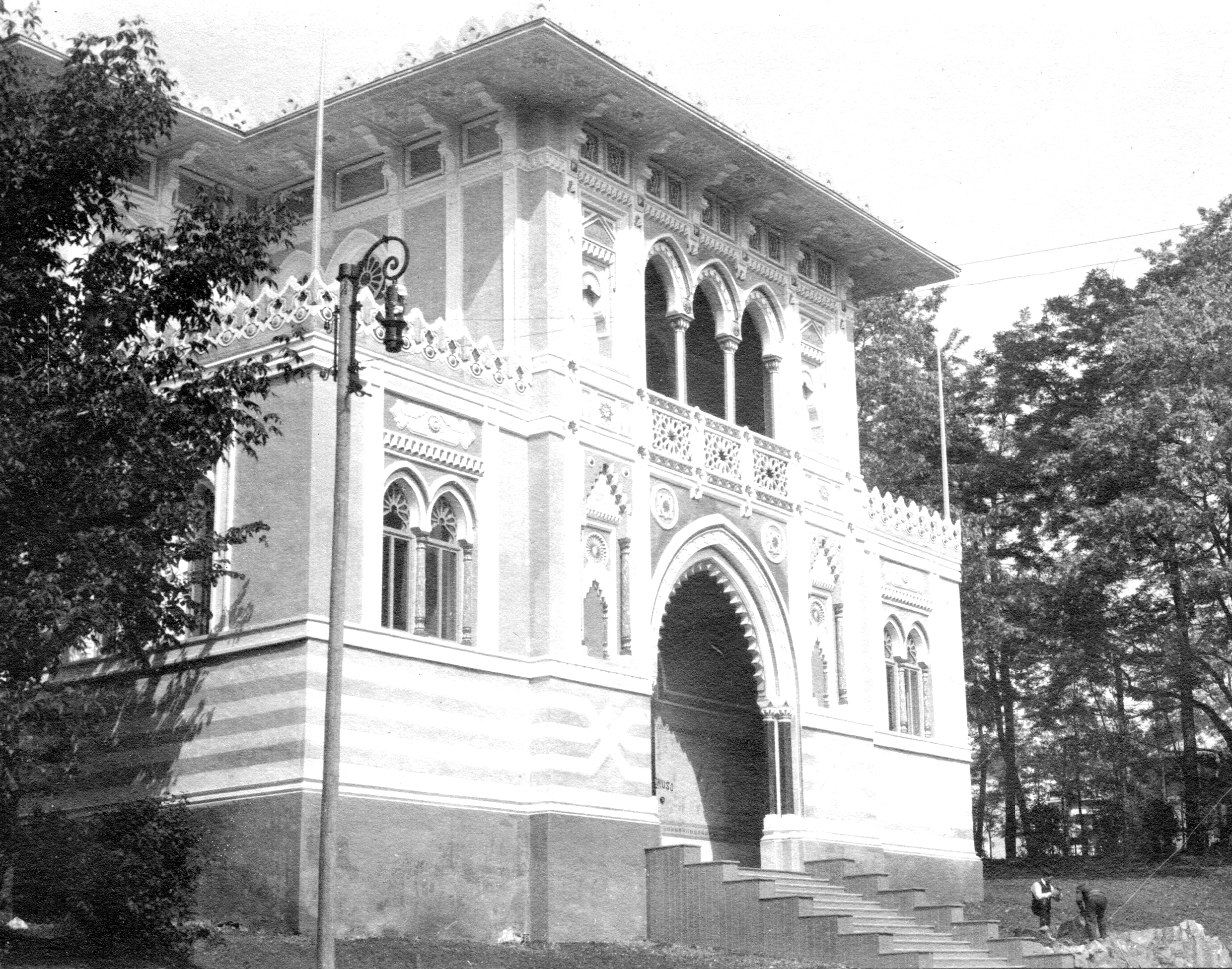 Léon Gurekian - Padiglione Impero Ottomano all'Esposizione Internazionale - Torino